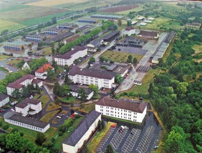 Luftbild der Graf-Haeseler-Kaserne Kassel aus dem Jahre 1993